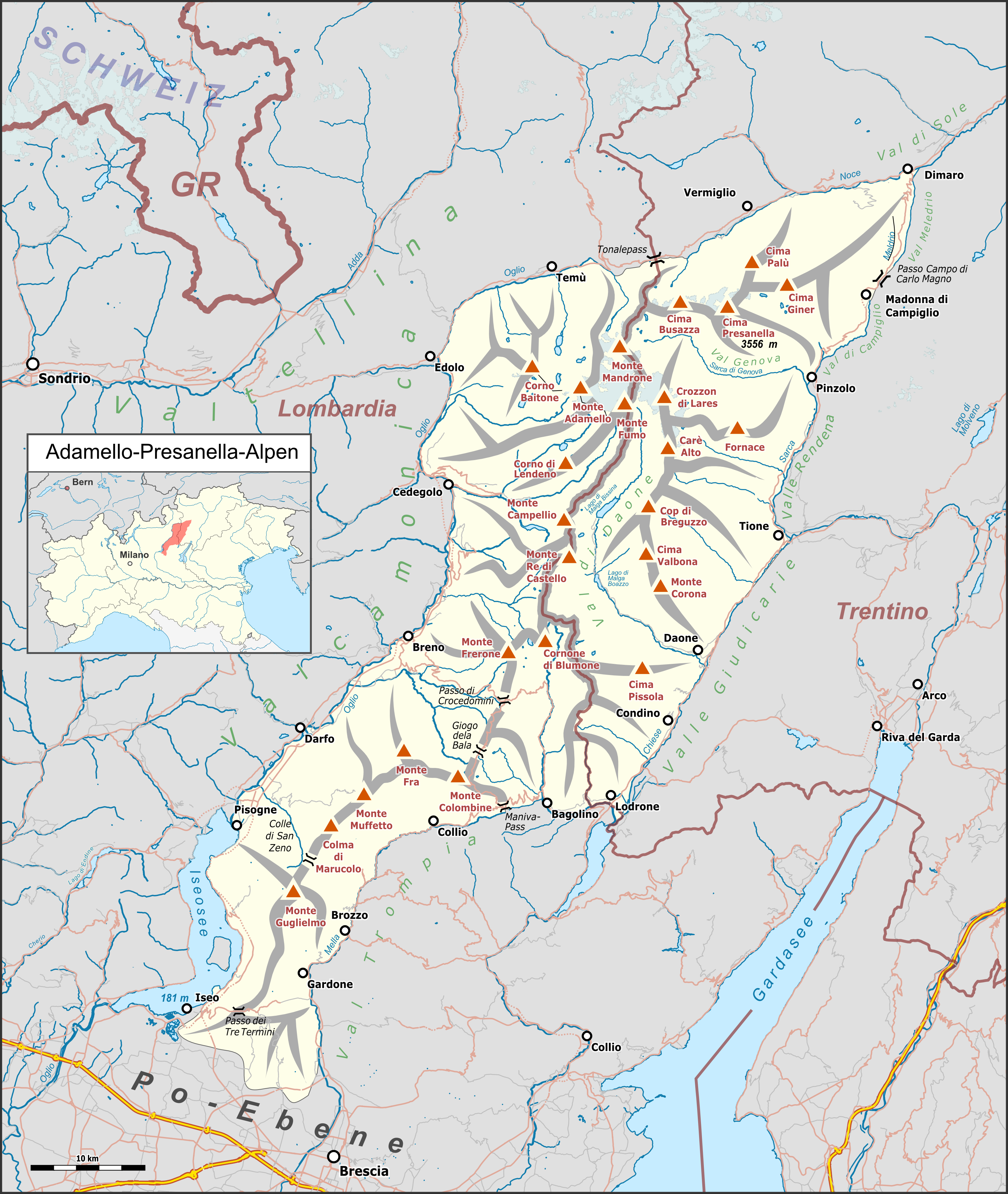 Übersichtskarte der Adamello-Presanella-Alpen